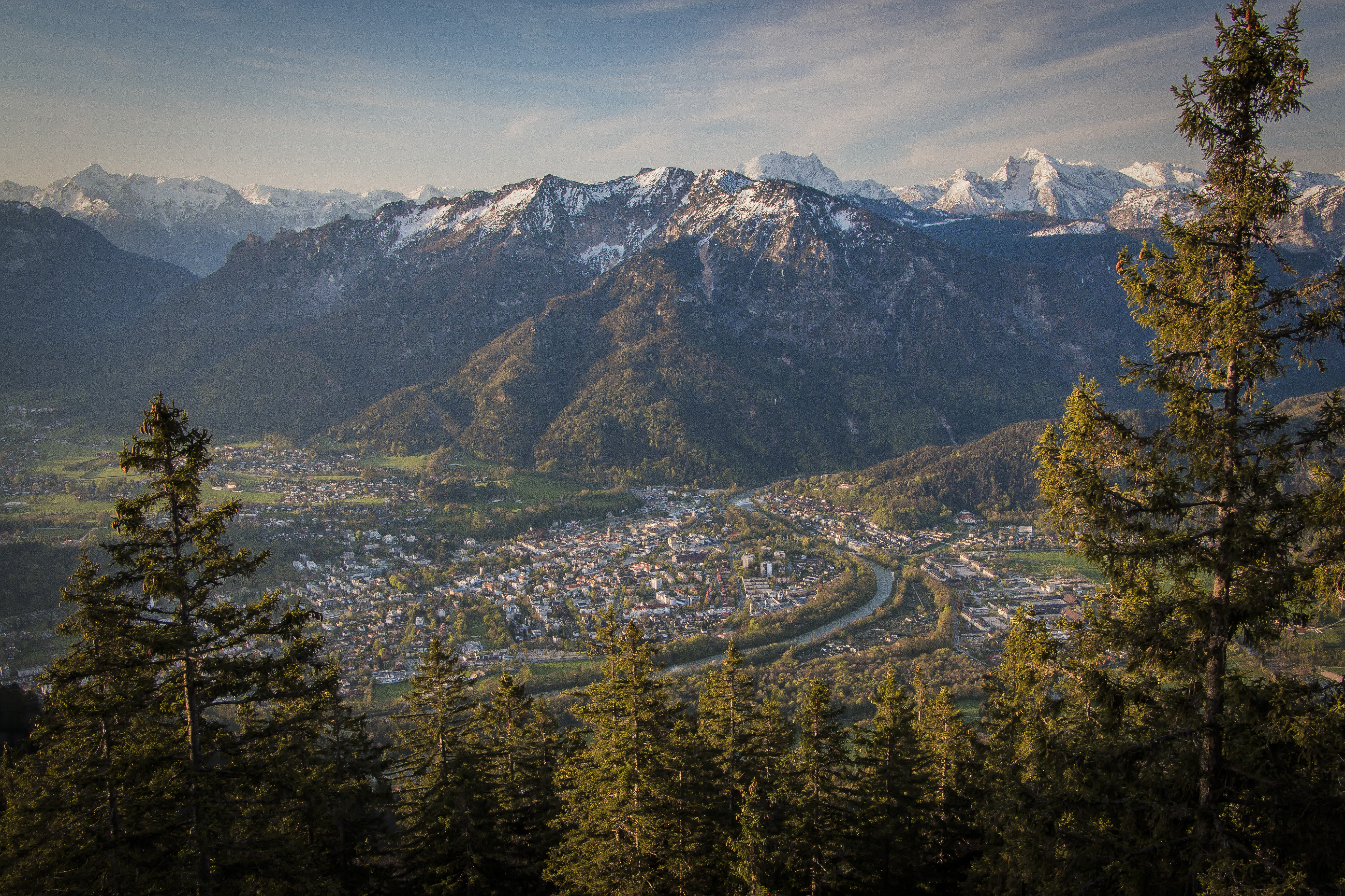 Biosphärenreservat Berchtesgadener Land: Bad Reichenhall und das Lattengebirge mit der „schlafenden Hexe“ und dem Predigtstuhl. Im Hintergrund die schneebedeckten Berchtesgadener Alpen mit Hoher Göll und Watzmann. Aufgenommen wurde das Bild auf dem Weg zum Hochstaufen über die „steinernen Jäger“.